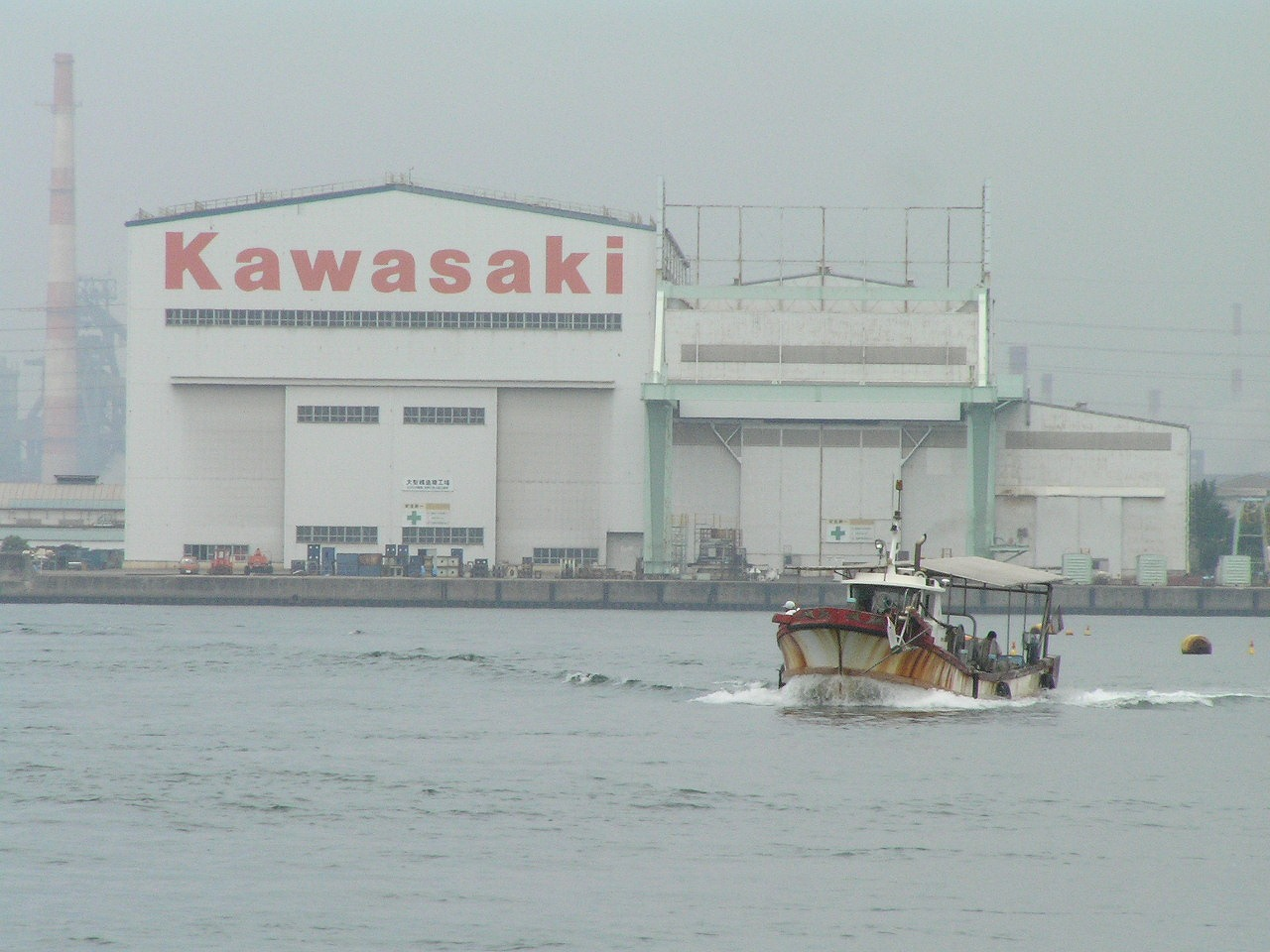 川崎重工業株式会社 播磨工場